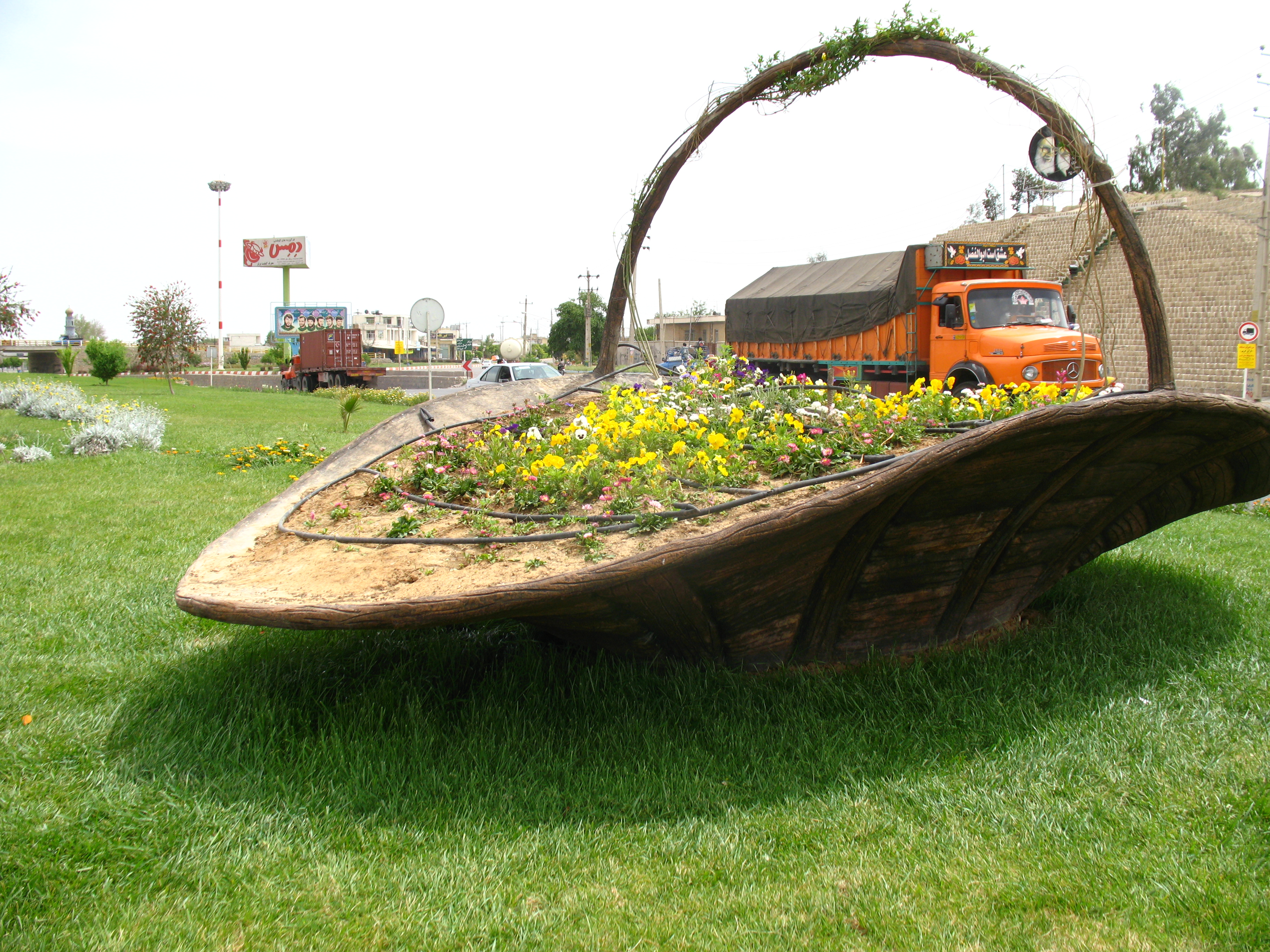 Fasa-Ordibehesht 89